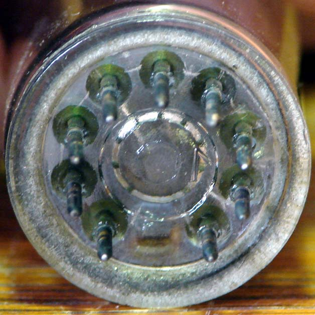 Novalsockel einer EQ80-Elektronenröhre